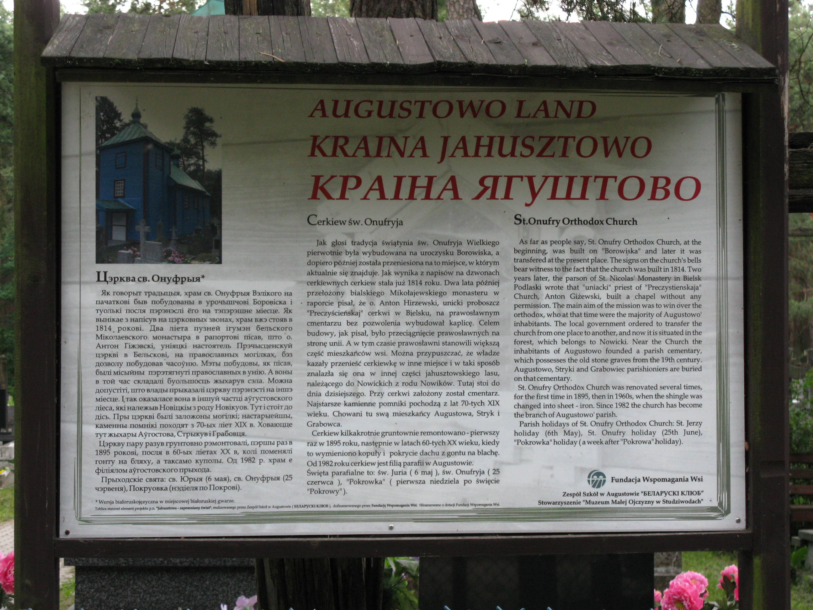 Tablica przy cerkwi św. Onufrego w Strykach